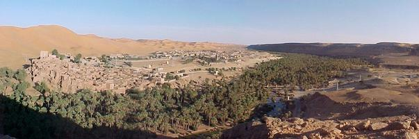 Photographie prise des hauteurs de la commune de M'doukal avec vue sur la palmeraie et ses fameux Ksour.